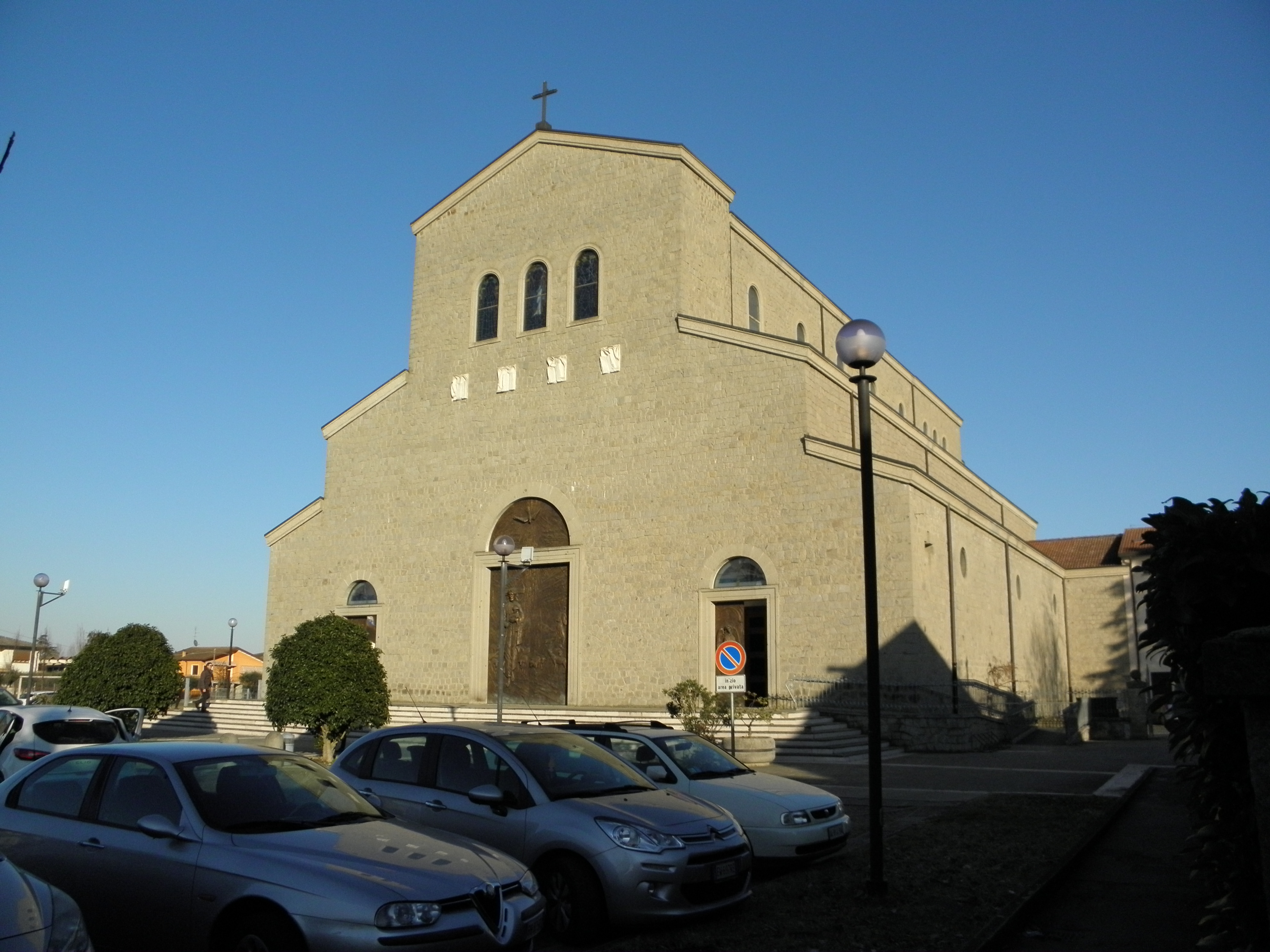 Montemerlo, frazione di Cervarese Santa Croce: la chiesa parrocchiale di San Michele Arcangelo.